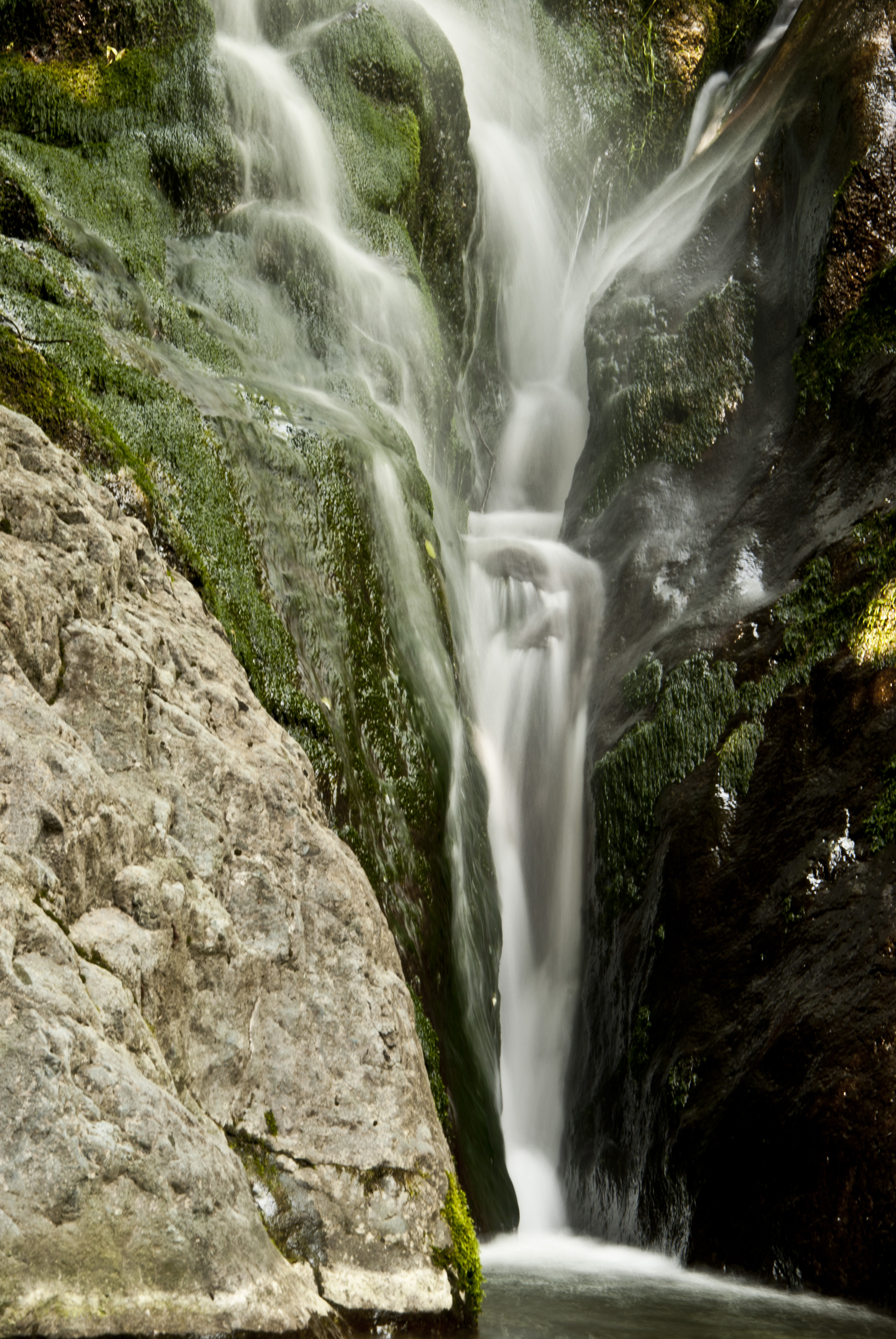 Cheile Borzești, judetul Cluj